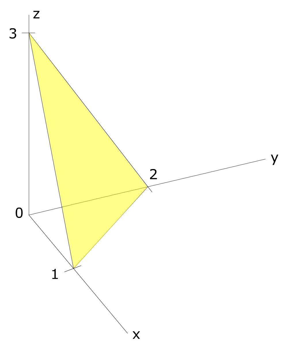 Miller Index 123